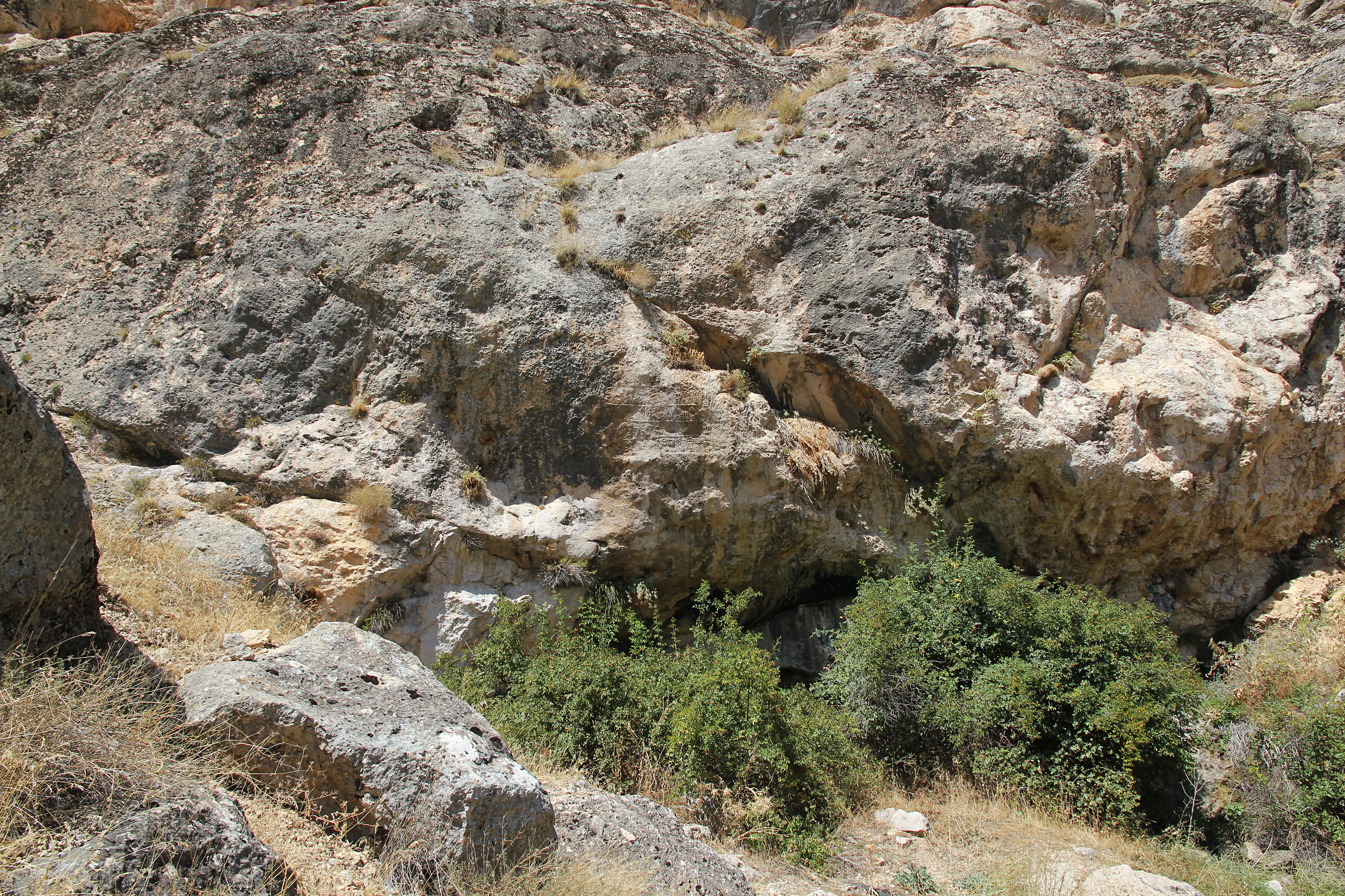 Luwische Felsinschriften von Gürün, Zentraltürkei, Untere Inschrift "Gürün A"